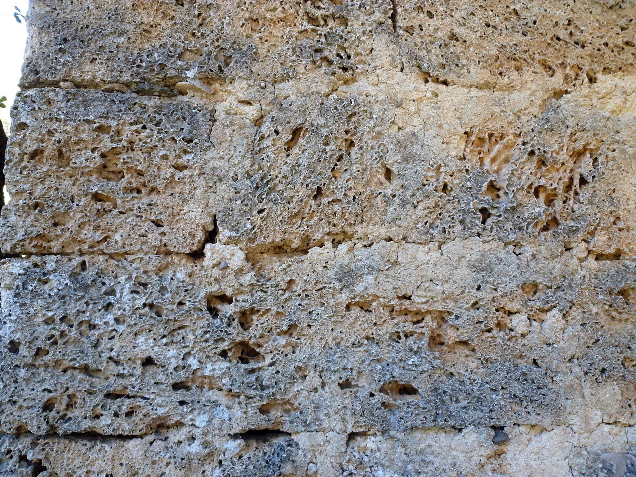 Sant Quintí de Cambrils (Odèn): l'església está construïda totalment amb carreus de pedra tosca o travertí